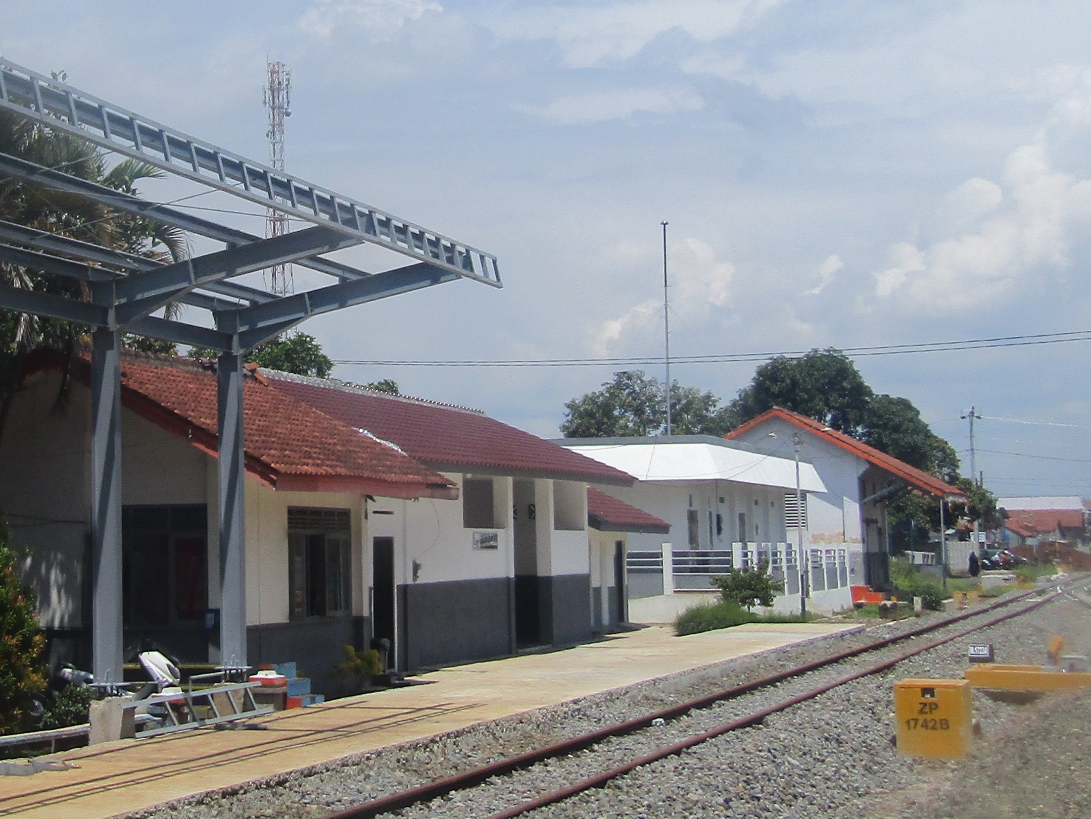 Stasiun Tambak, 2020